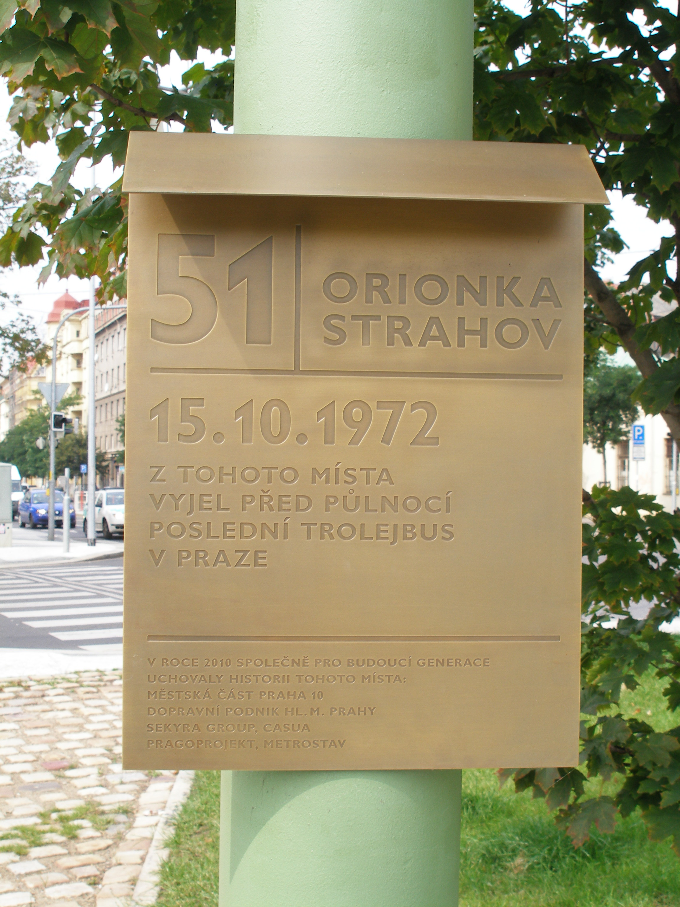 Trolejbusový památník na Orionce.